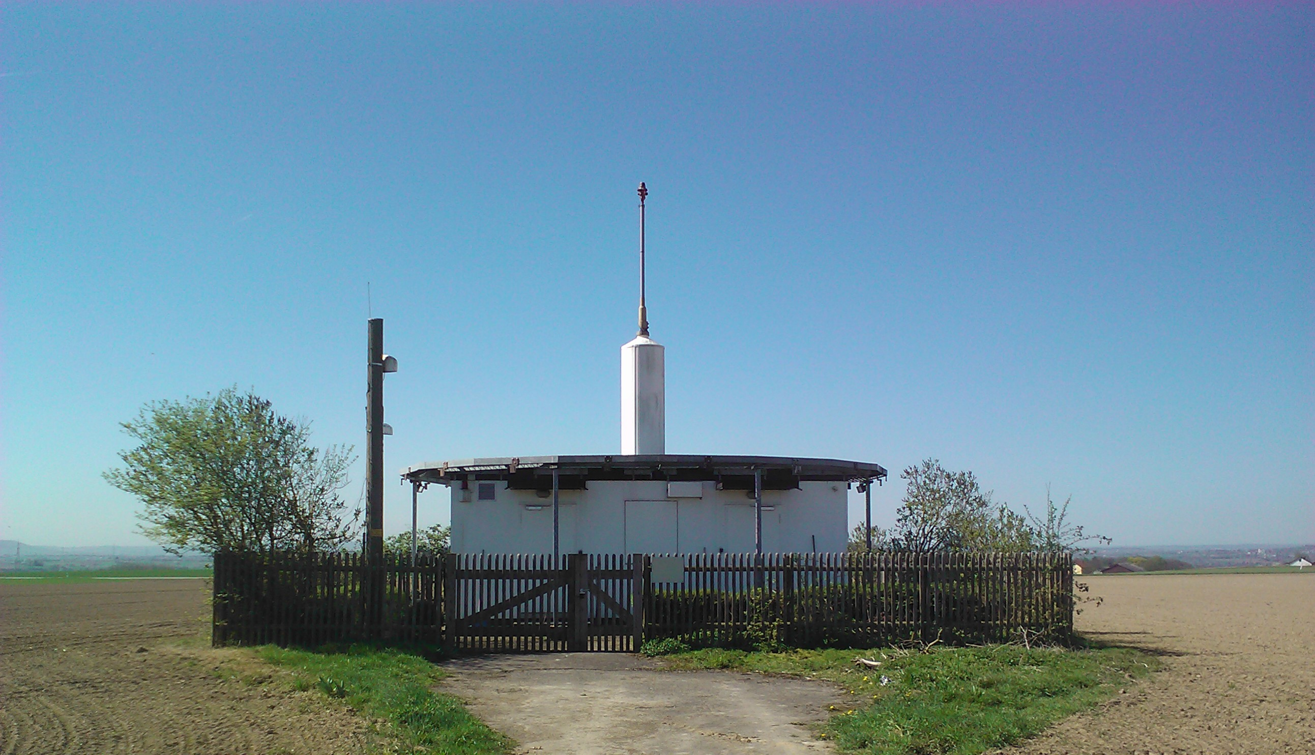 VOR Luburg (LBU)